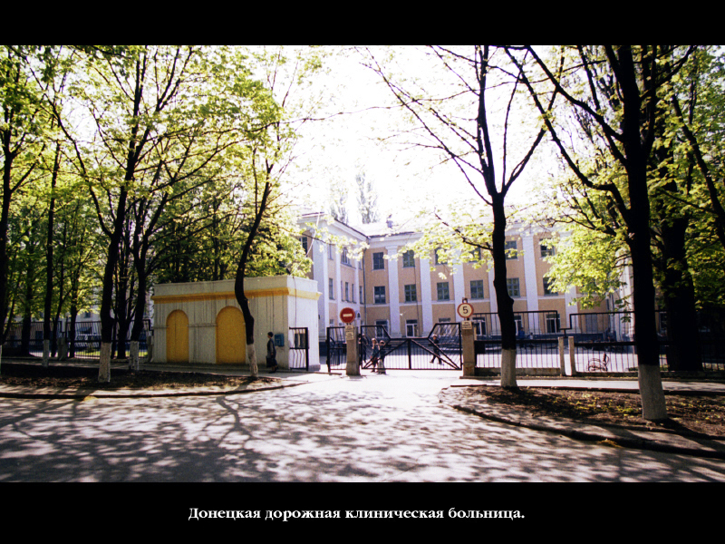 Фотография с диска Анастасии Федоренко «Донецк. Увидеть и полюбить».